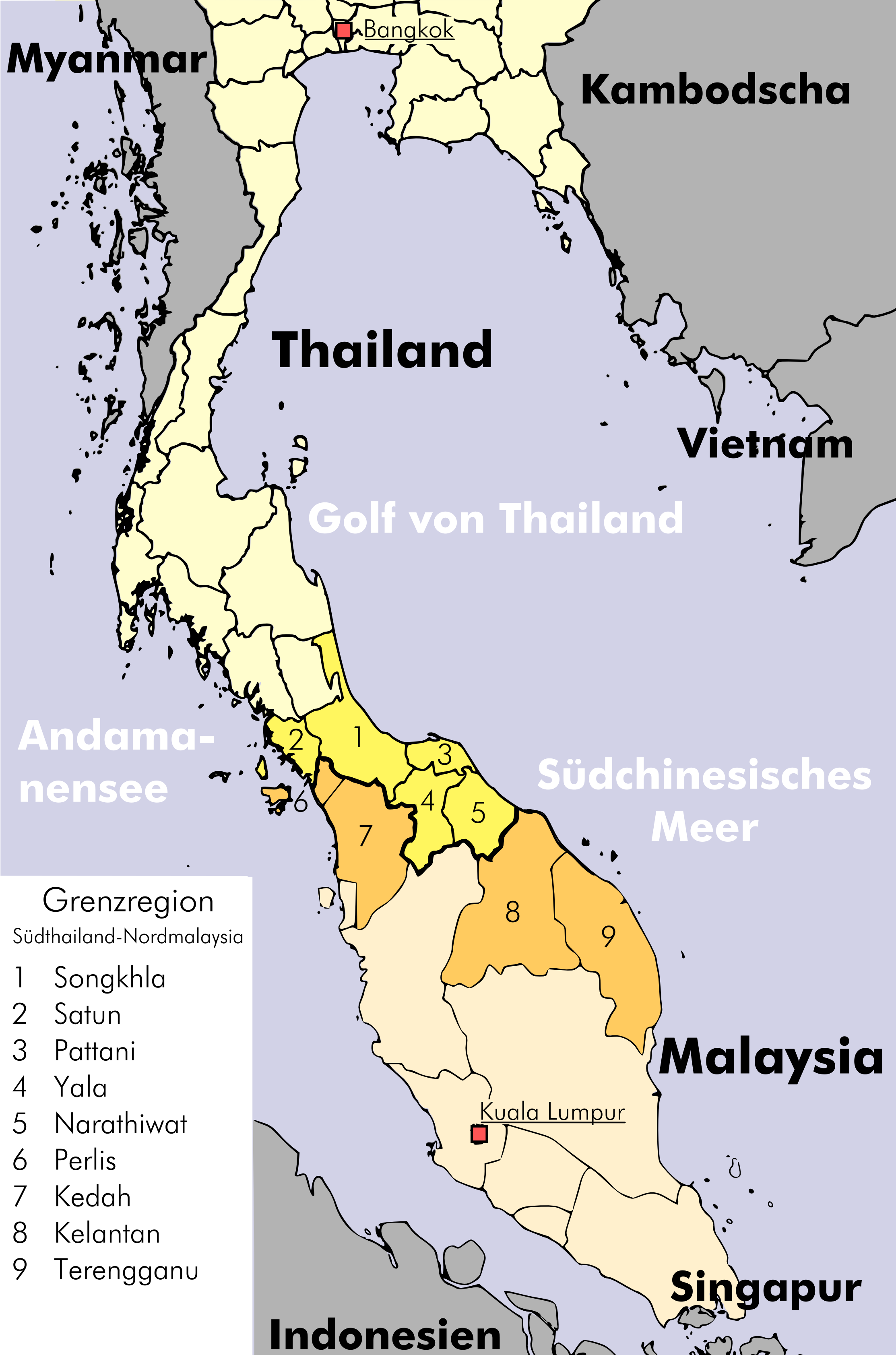 Karte der Thailändisch-Malaiischen Grenzregion.